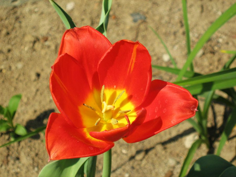 Tulipan (Tulipa vvedenskyi Botschantzeva) z mojego ogrodu